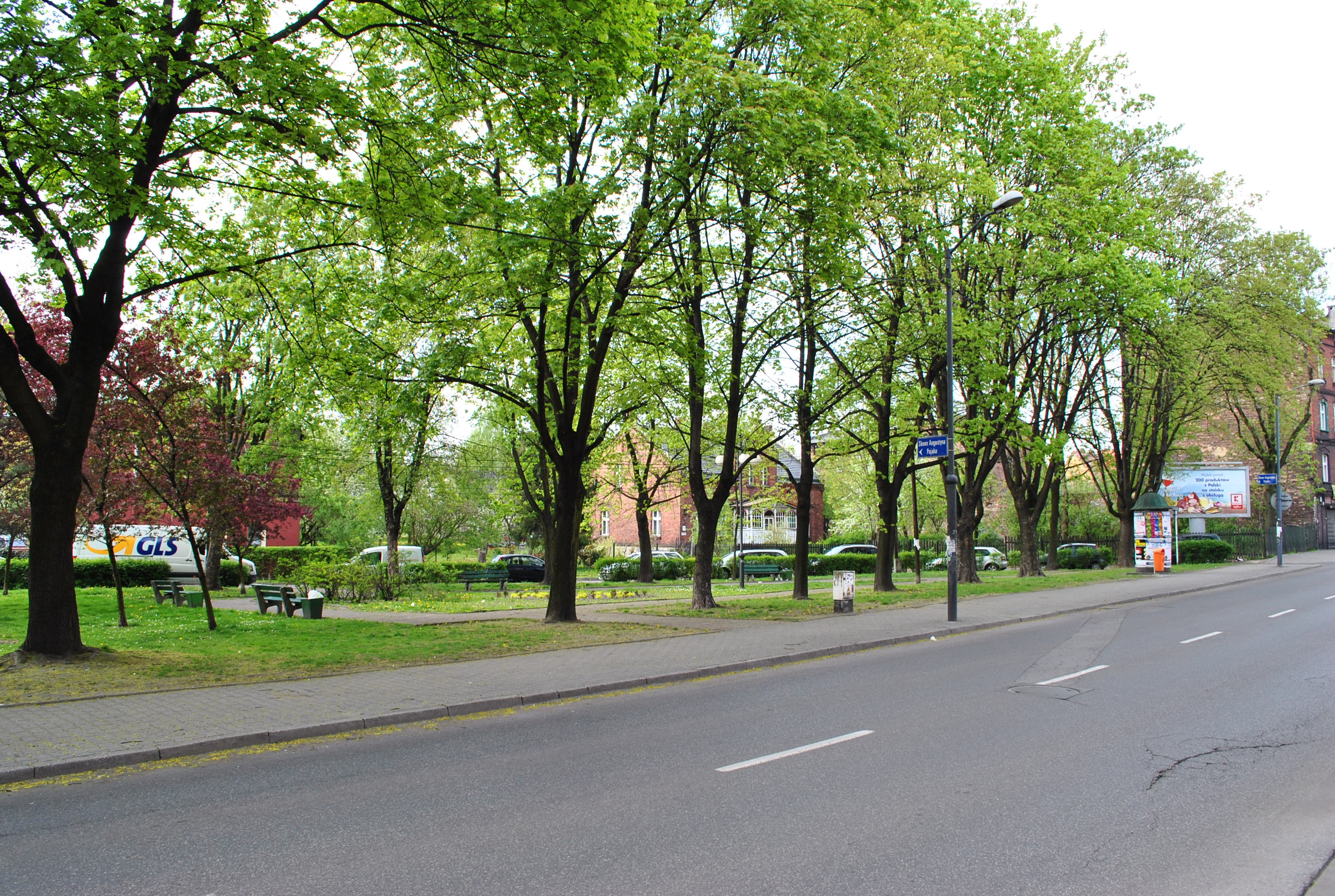 Katowice, Dąb. Skwer Augustyna Pająka przy ul. Dębowej